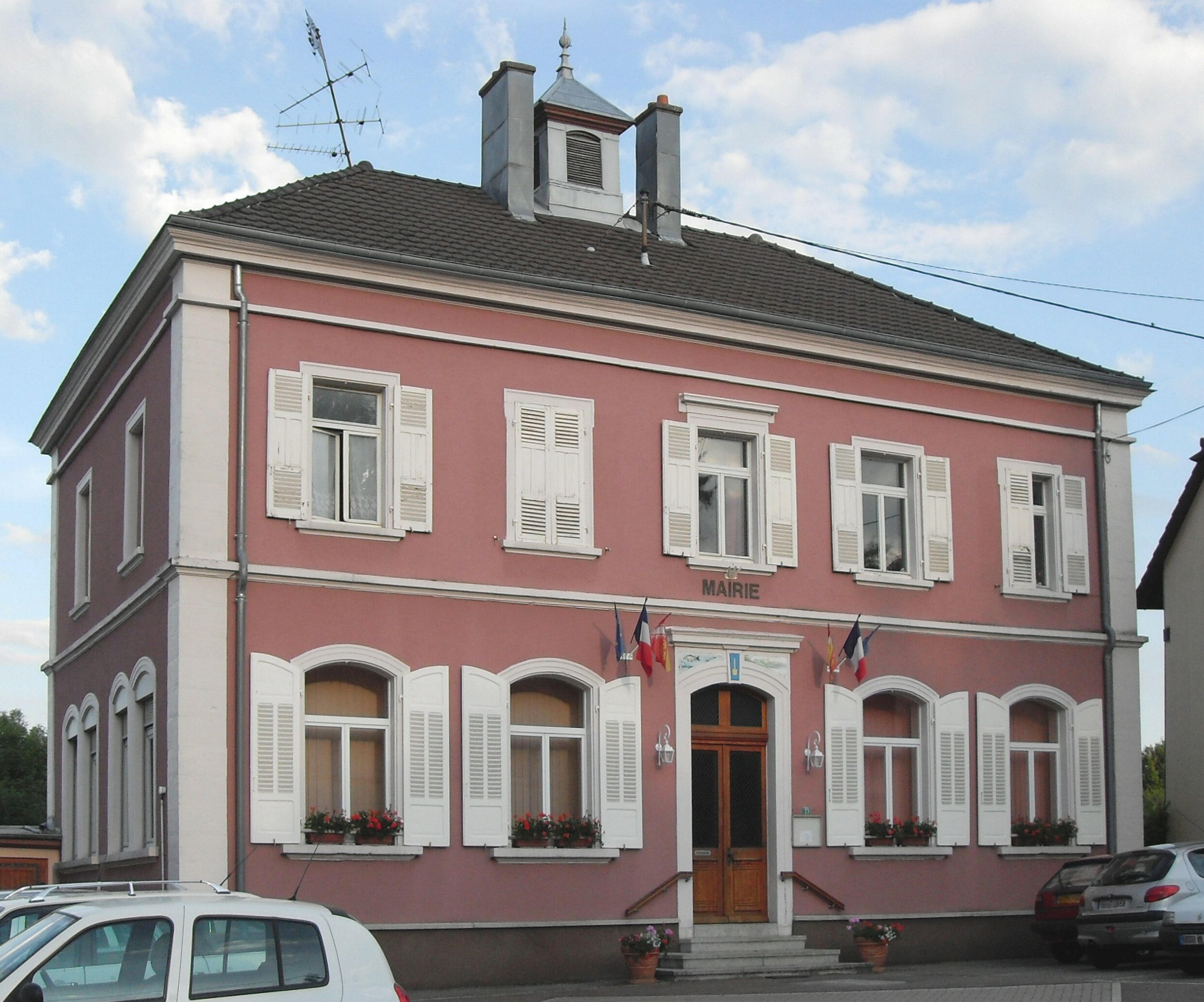 La mairie de Friesen